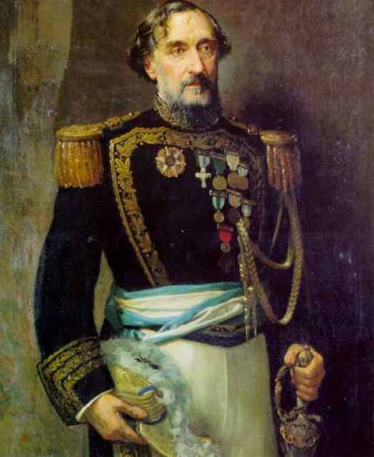 Presidente argentino Bartolomé Mitre